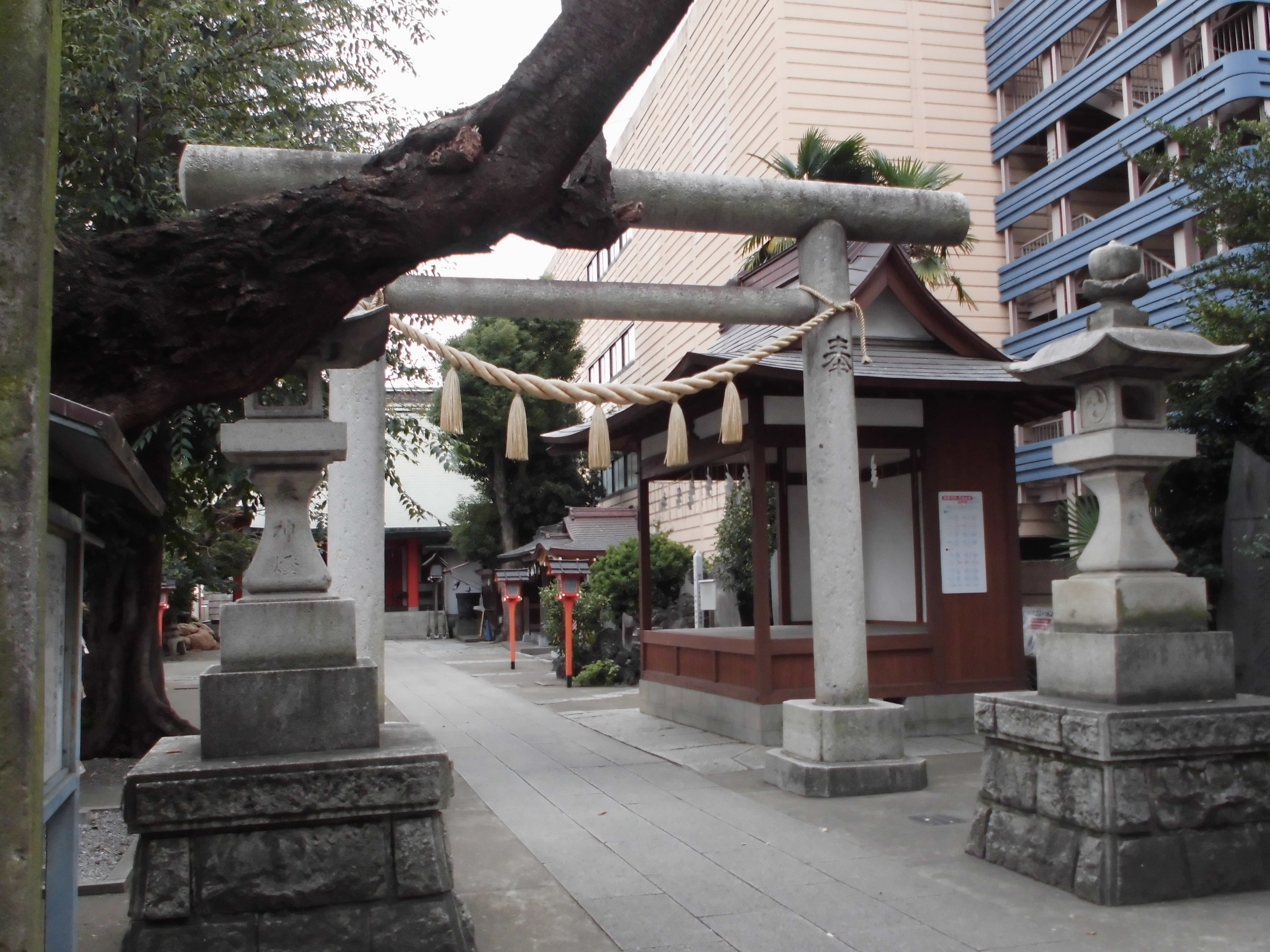 埼玉県上尾市の氷川鍬神社の鳥居。